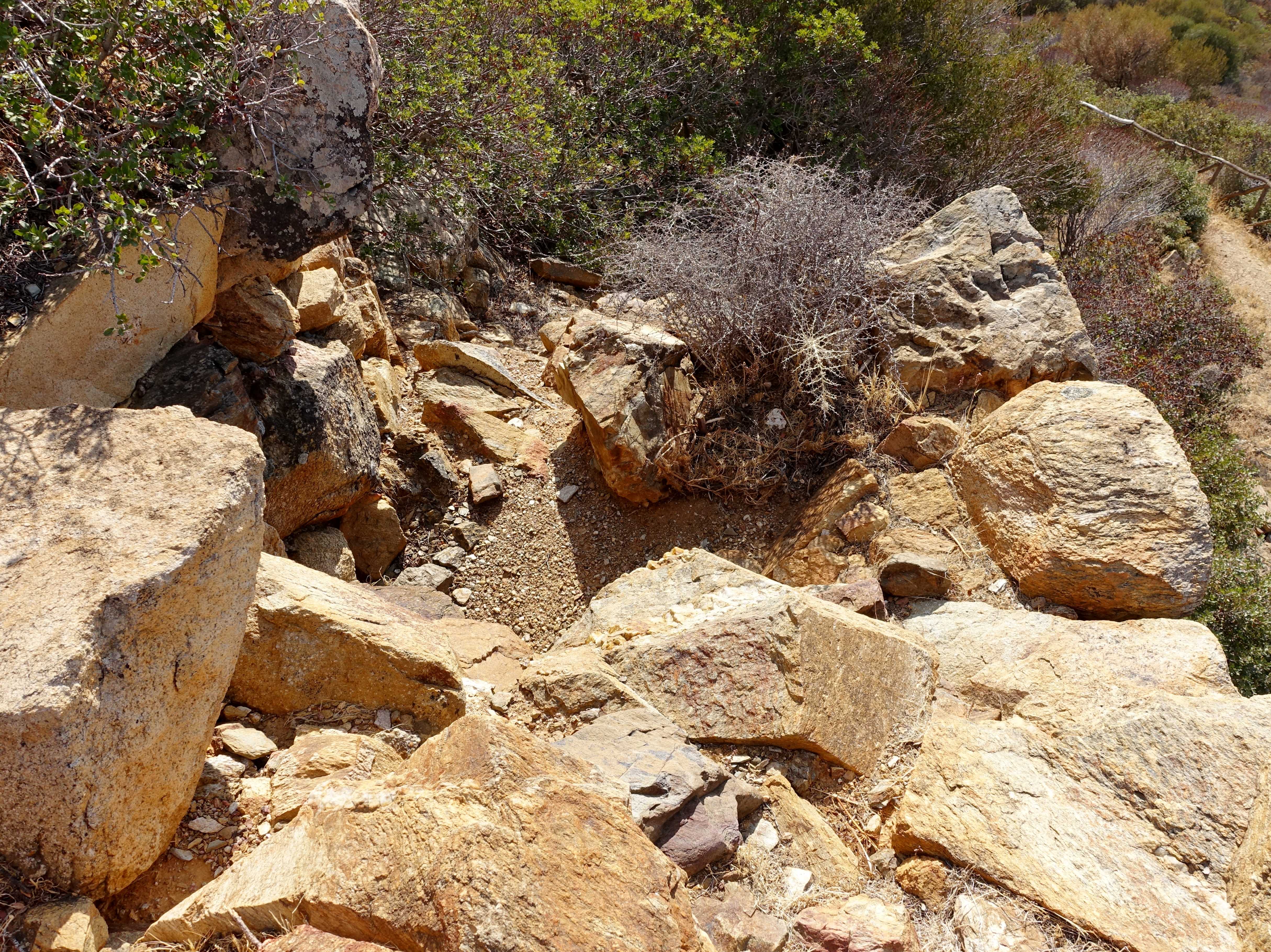 Nuraxi de Baccu Idda (Nuraghe von Baccu Idda), Gemeinde Domus de Maria, Sardinien, Italien